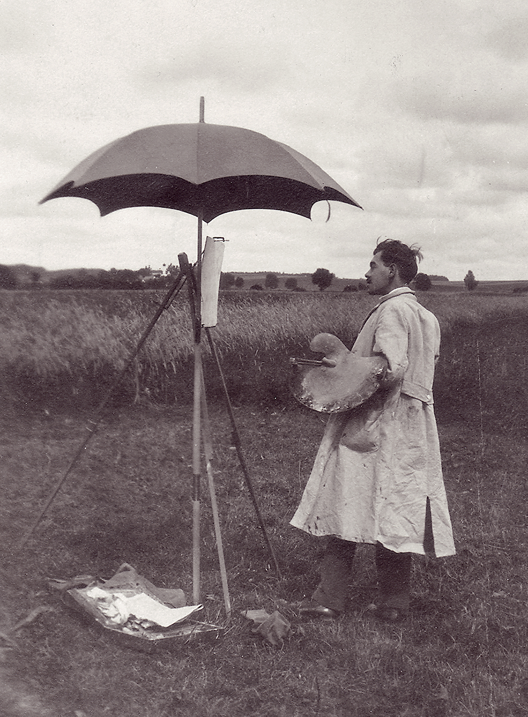 Der Landschaftsmaler Willy Wenz bei einer Malstunde im Jahr 1920 in Haimhausen während seines Kunststudiums.Depicted person: Willy Wenz – German painter